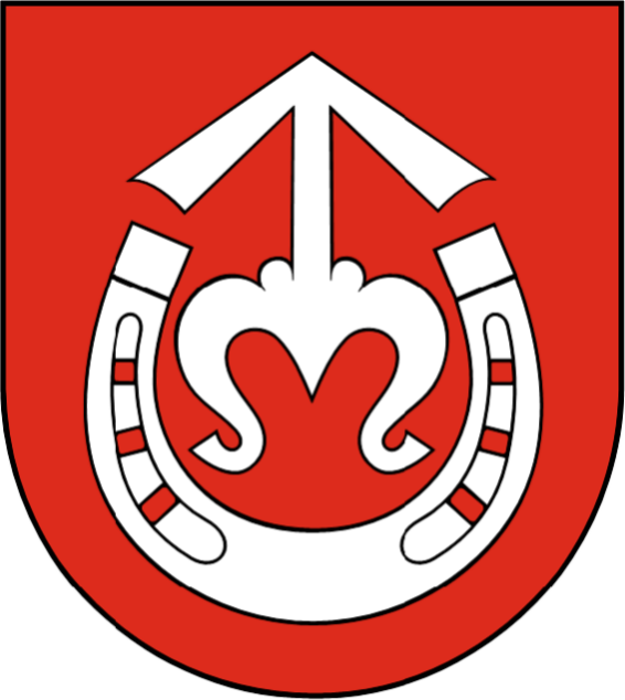 Herb gminy Wojciechów